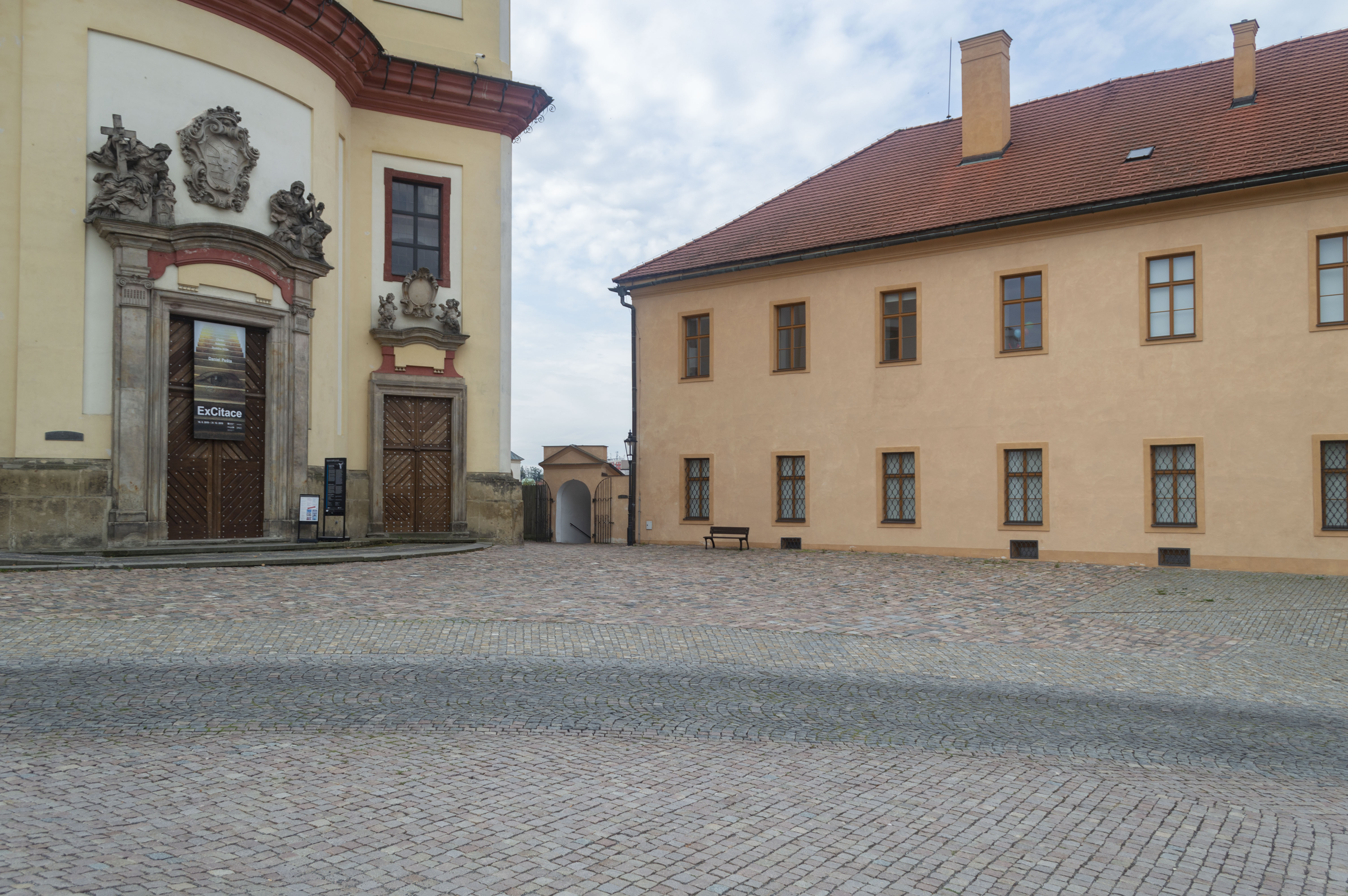 Kostel Nalezení svatého Kříže, fortna, Piaristické gymnázium, Litomyšl - místo, kde nejspíše stál kostel sv. Klimenta